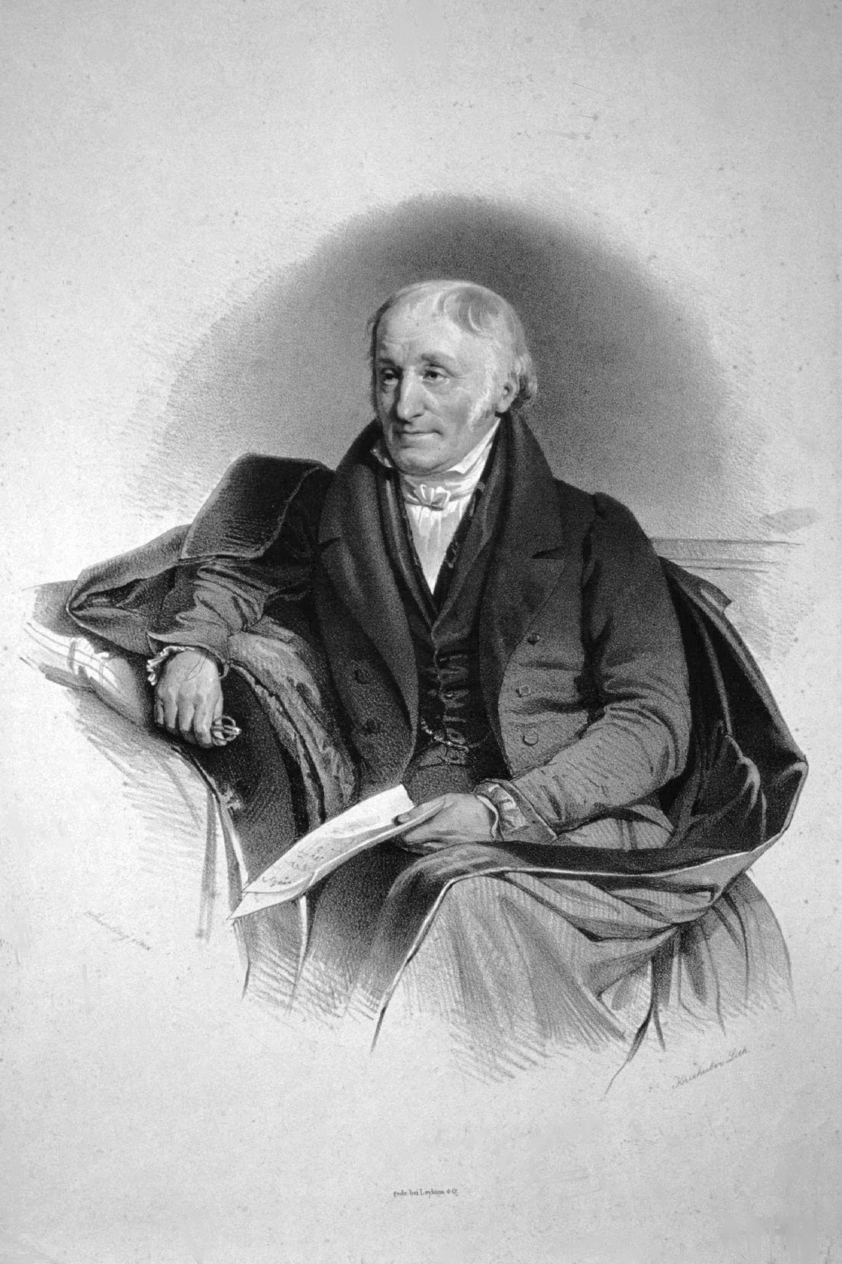 Bernhard Eskeles, Lithographie von Josef Kriehuber